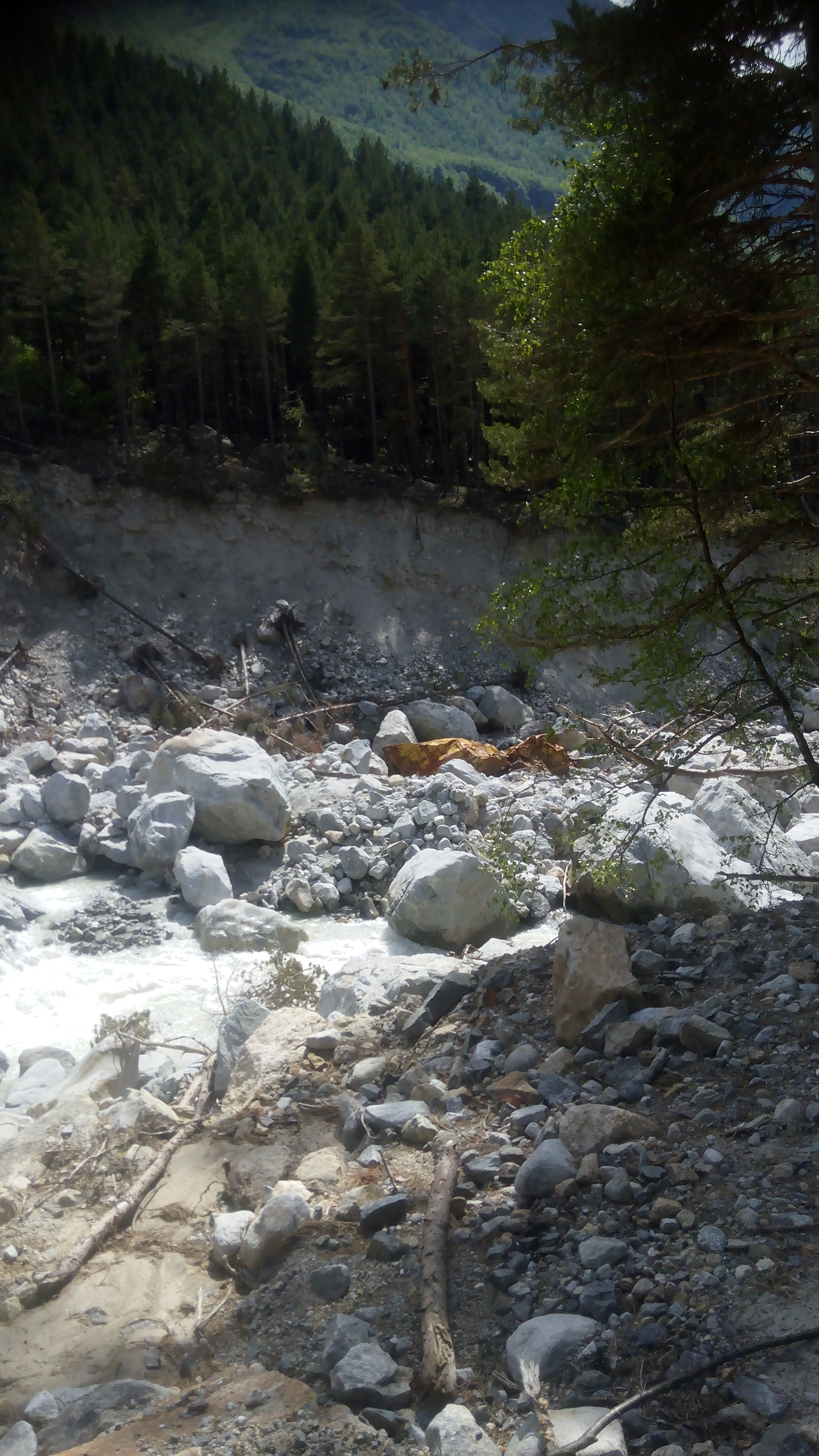 Снесённая и покорёженная селем будка